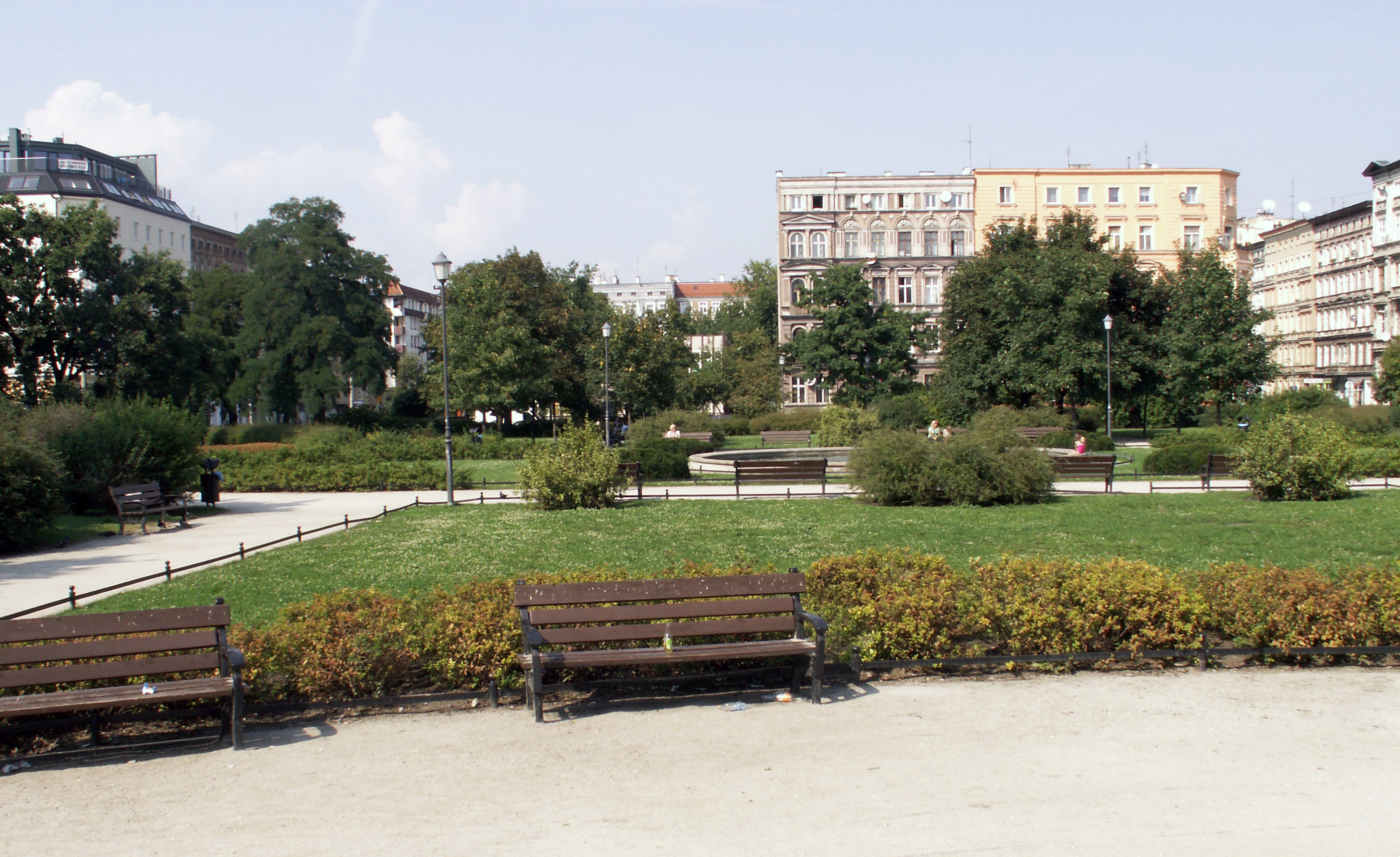 Wrocław, rejon placu św. Macieja (zespół urbanistyczny), 1873